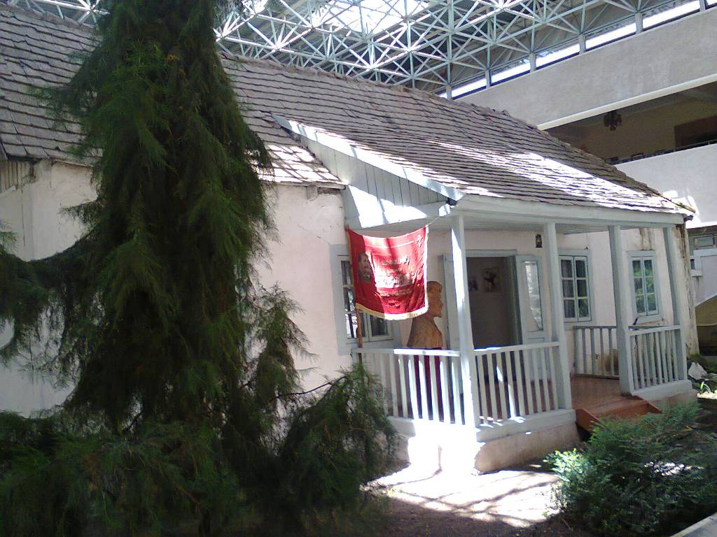 Stepan Shahumyan's home museum 7/23